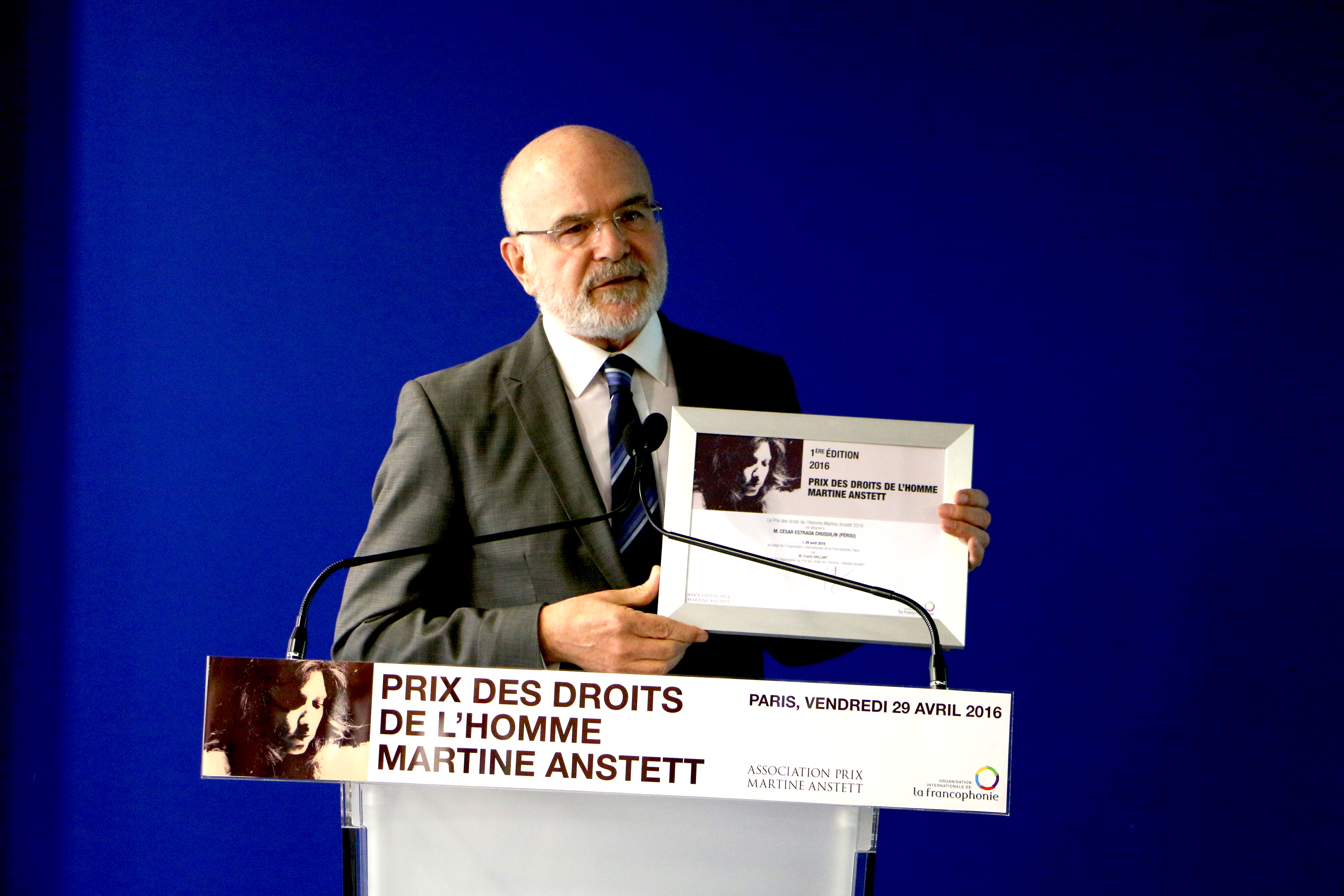 Au siège de l'OIF, le 29 avril 2016, Michel Forst, rapporteur spécial des Nations Unies sur la situation des défenseurs de droits de l'homme avec le diplôme du lauréat, César Estrada